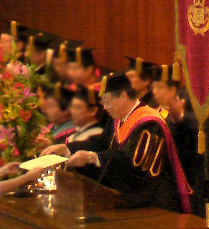 白井 克彦（しらい かつひこ、1939年9月24日 - ）は、日本の工学者。放送大学学園理事長（2011年4月 -）。日本電信電話株式会社取締役（2012年6月 -）。第15代早稲田大学総長（2002年 - 2010年）。専門は知能情報学。学位は工学博士（早稲田大学）。(Katsuhiko Shirai, former president of Waseda University)